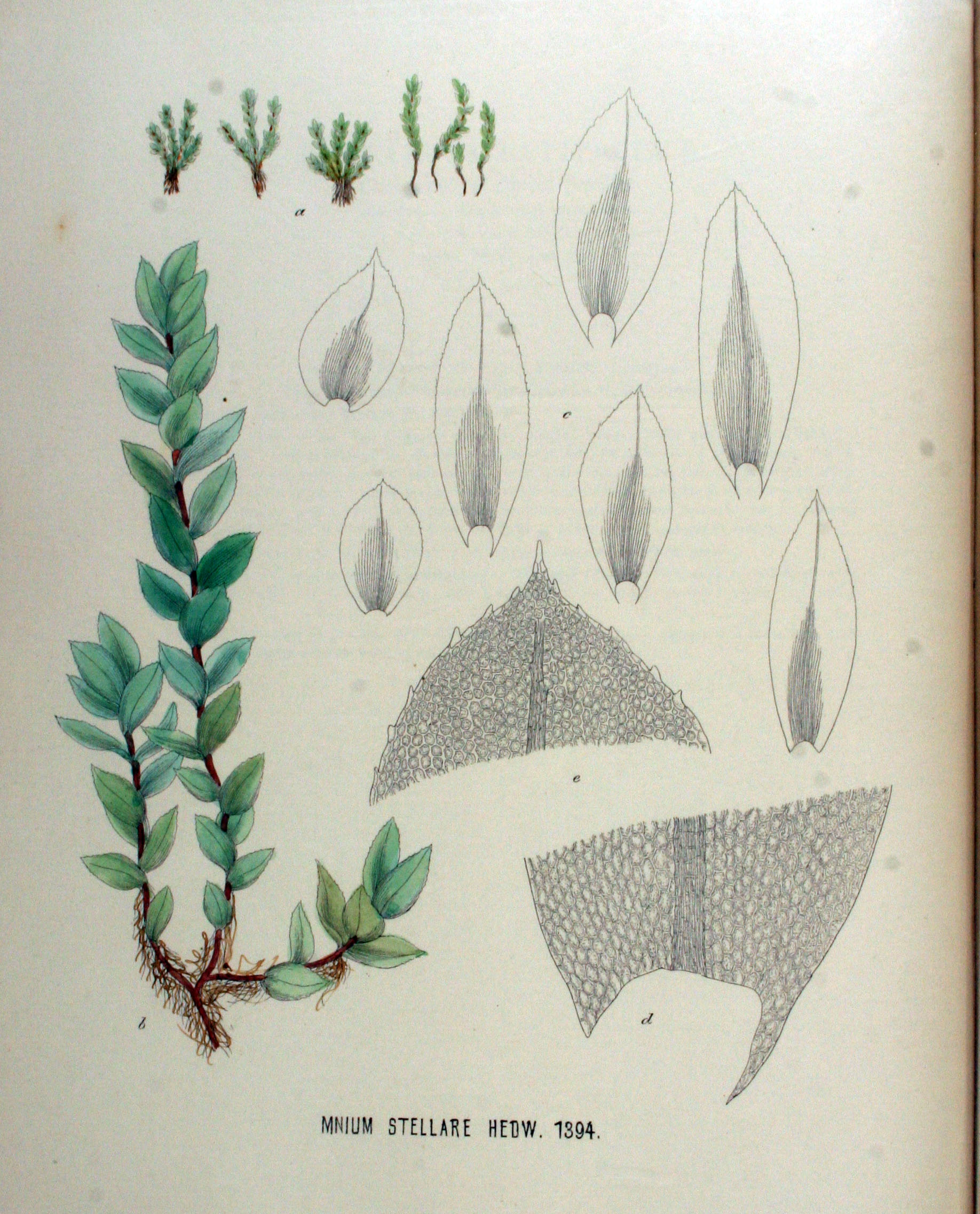 Mnium stellare